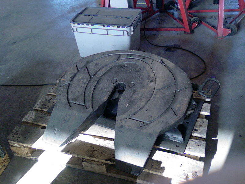 Schotel voor vrachtwagen